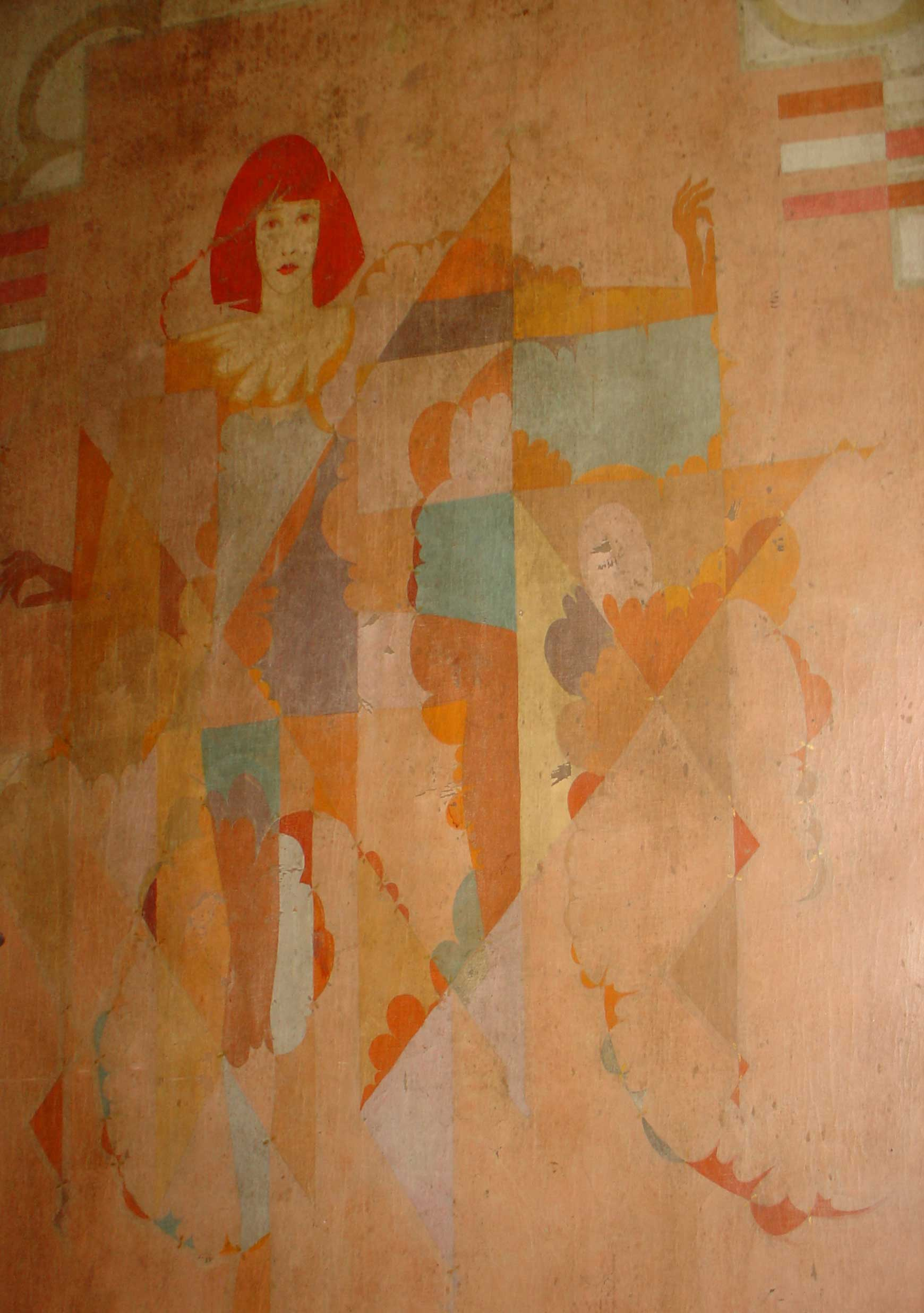 Detail van een Art-Deco decoratie op de wand van café Central op de Markt te Gouda, gemaakt door Pieter Den Besten